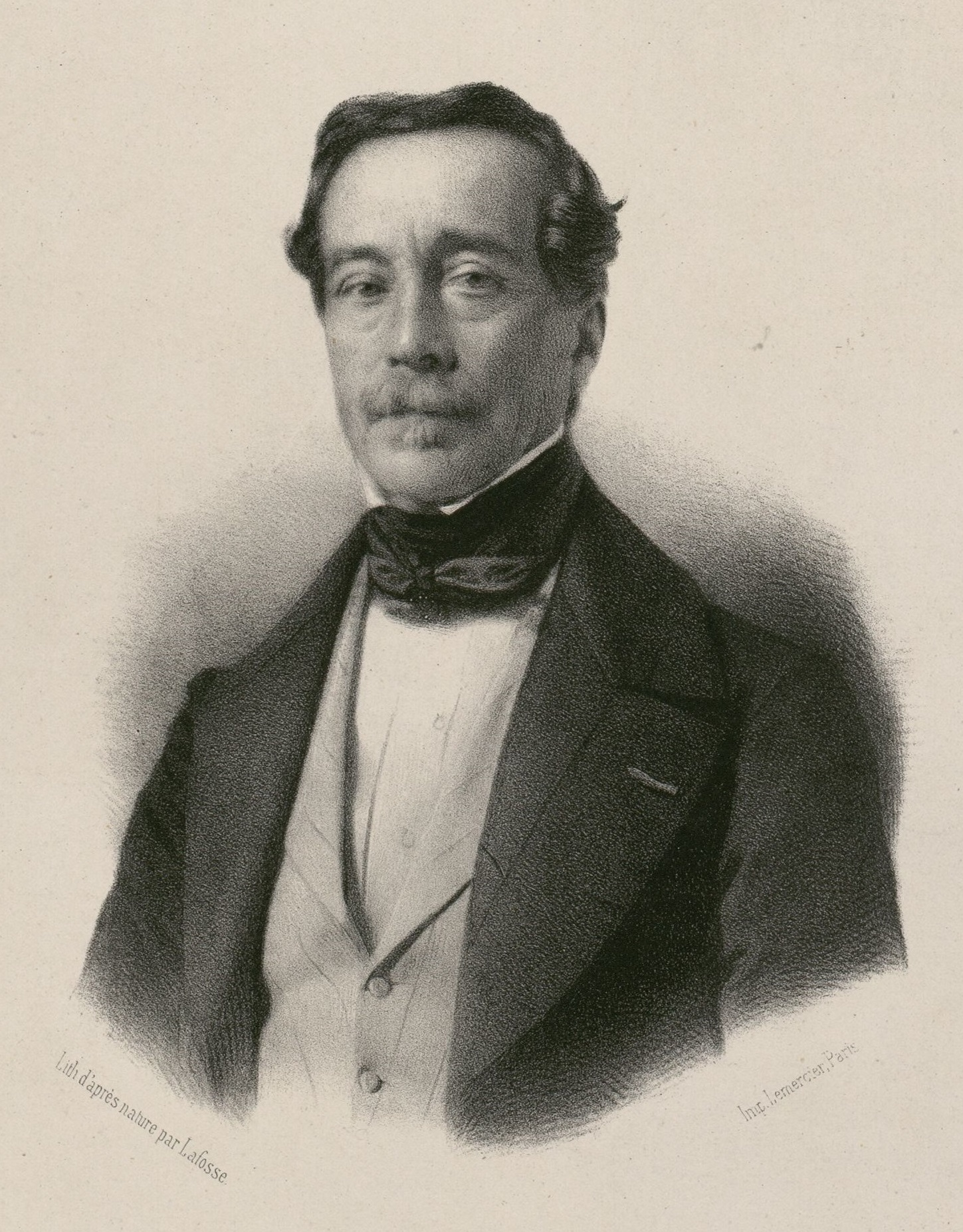 Nicolas Changarnier, né à Autun (Saône-et-Loire), le 26 avril 1793, ex-Gouverneur général de l'Algérie. Lieutenant général, commandant-en-chef des Gardes nationales du département de la Seine, membre de l'Assemblée législative (1849).